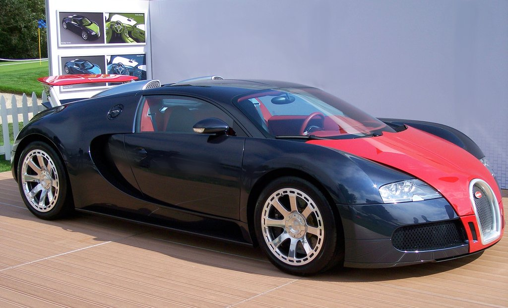 Bugatti Veyron shaheer